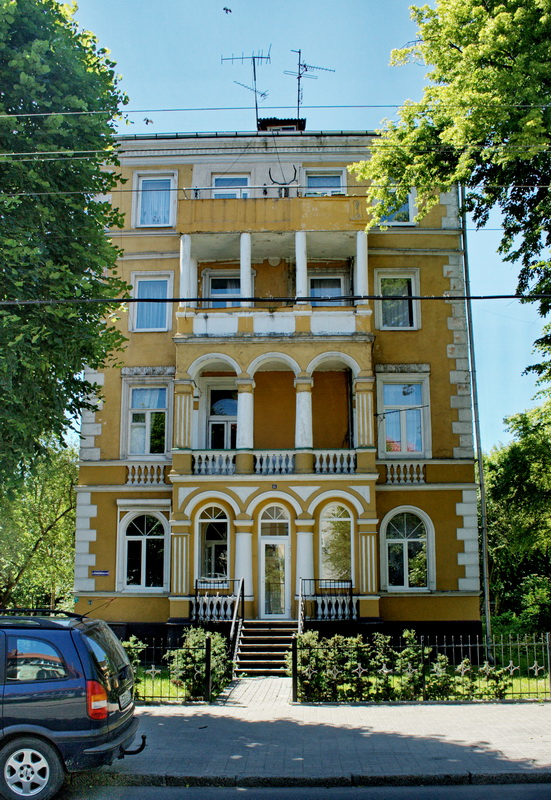 ul. Komsomolskaya (Luisenallee)